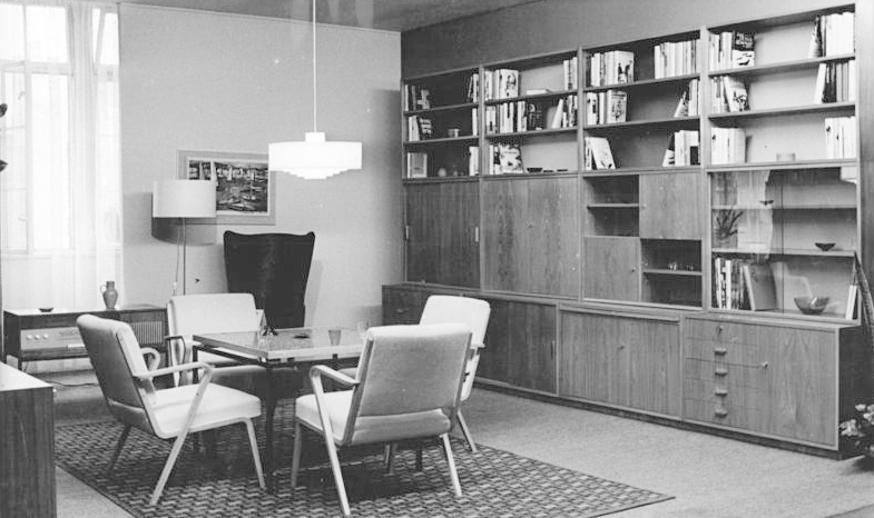 Schrankwand, VEB Deutsche Werkstätten Hellerau Zentralbild Koch-Kluge Tre-Sz 8.9.1964 Leipziger Herbstmesse 1964 Messehaus Union Diese Bücherwand - 4 m Modell 605-1 zeigt der VEB Deutsche Werkstätten Hellerau. Ausführung: Rüster natur mattiert.